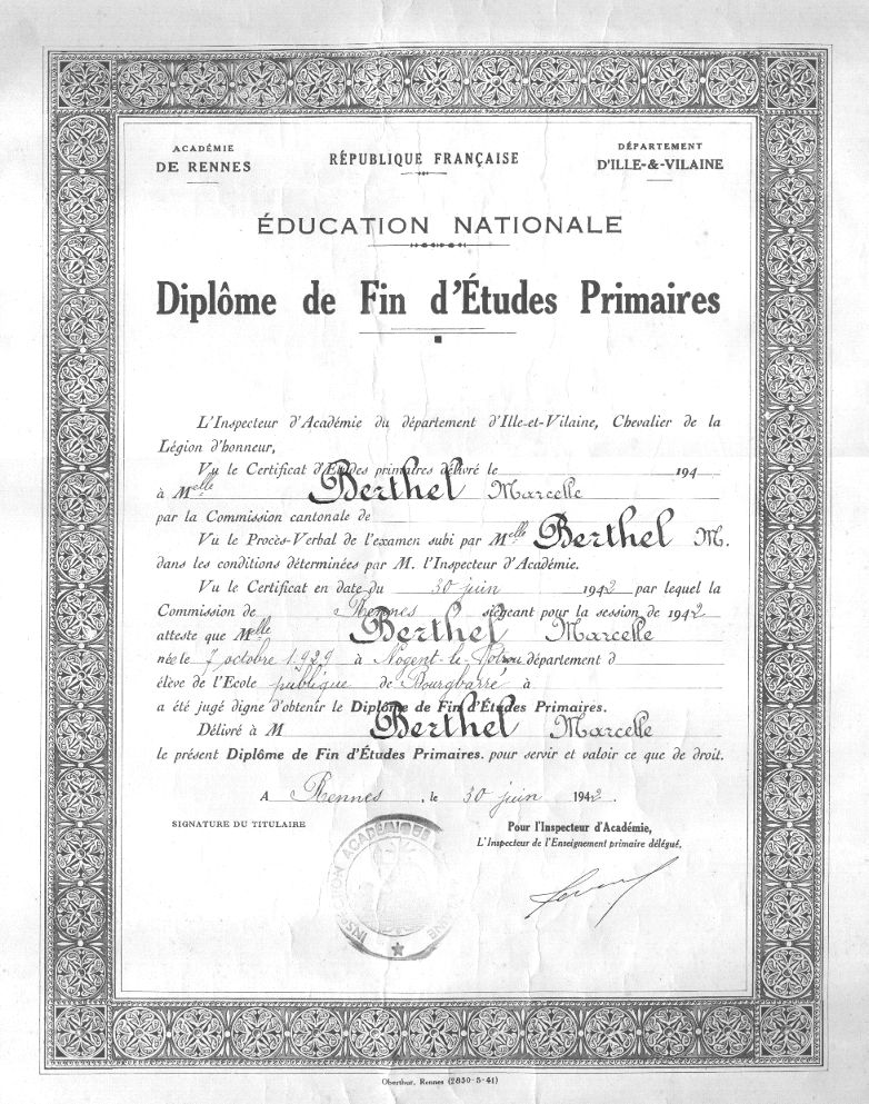 Diplôme de fin d'études primaires, délivré en 1943 à Rennes.